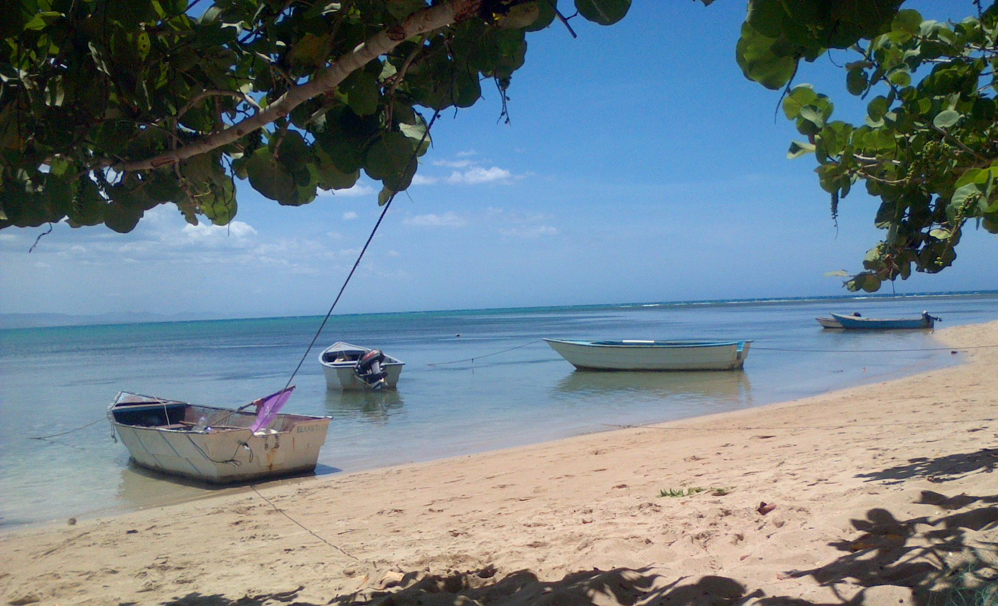 Foto tomada por wikipedista a unas Yolas en la playa del Castillo, La Isabela, Puerto Plata, República Dominicana el Domingo 18 de Agosto, 2013.